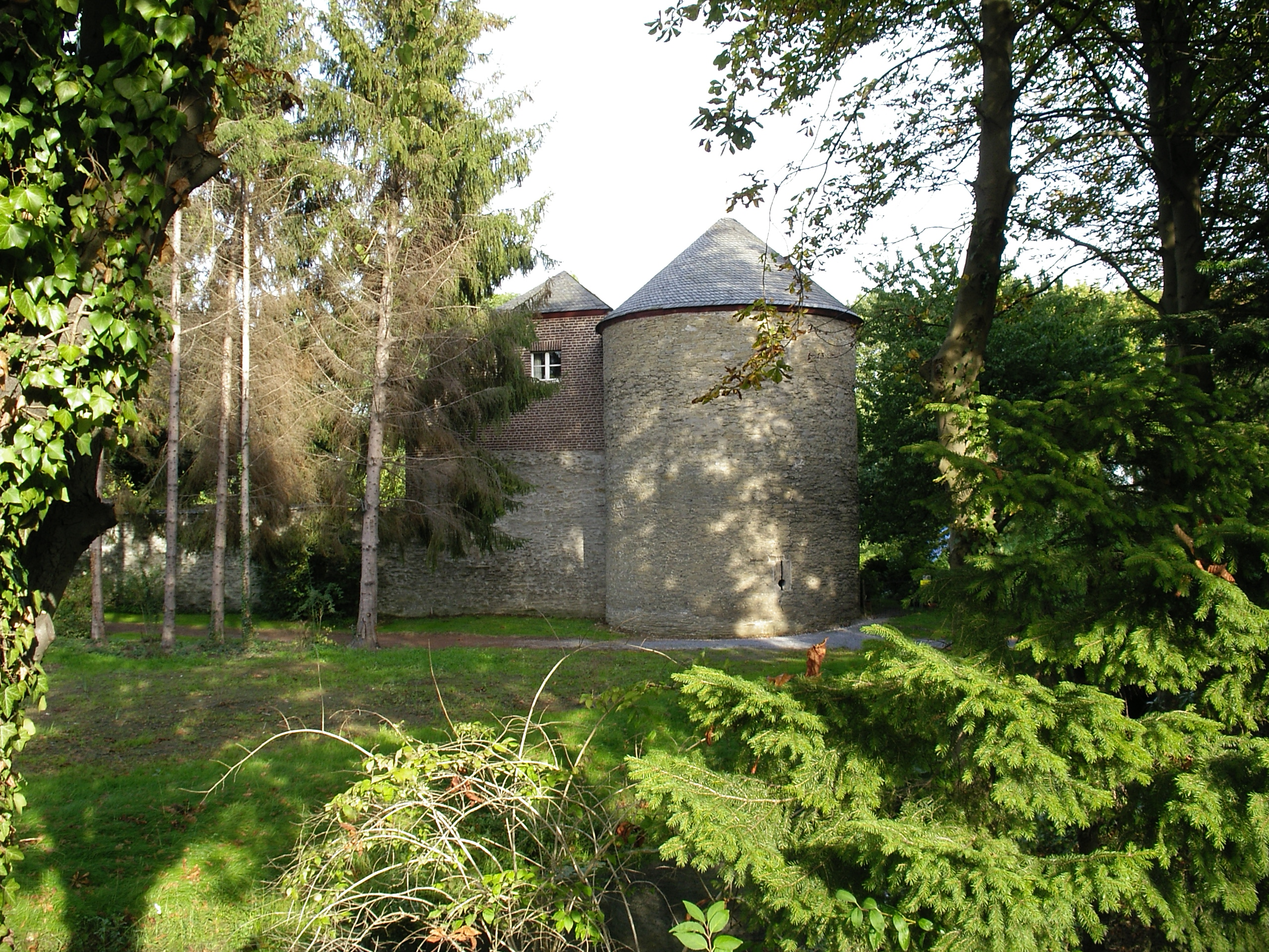 Haus Unterbach - Front